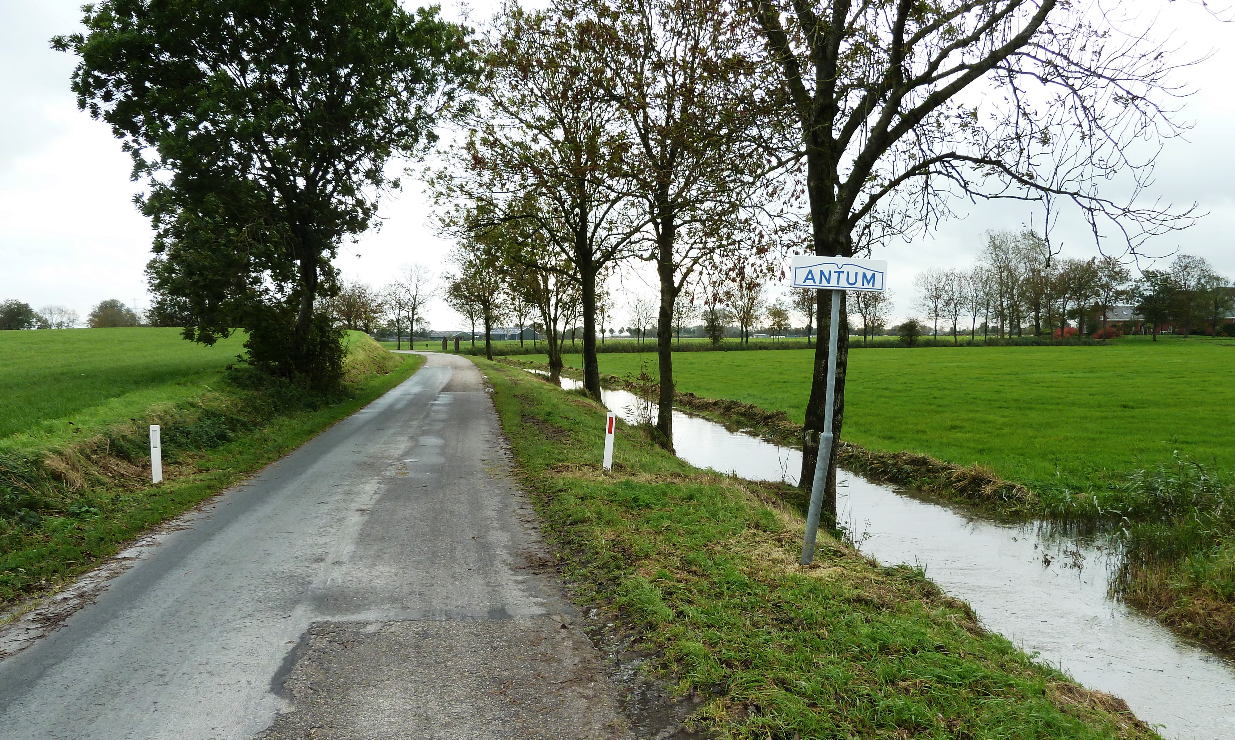 De voor driekwart afgegraven Groningse wierde Antum met rechts de boerderij Koepon Antuma